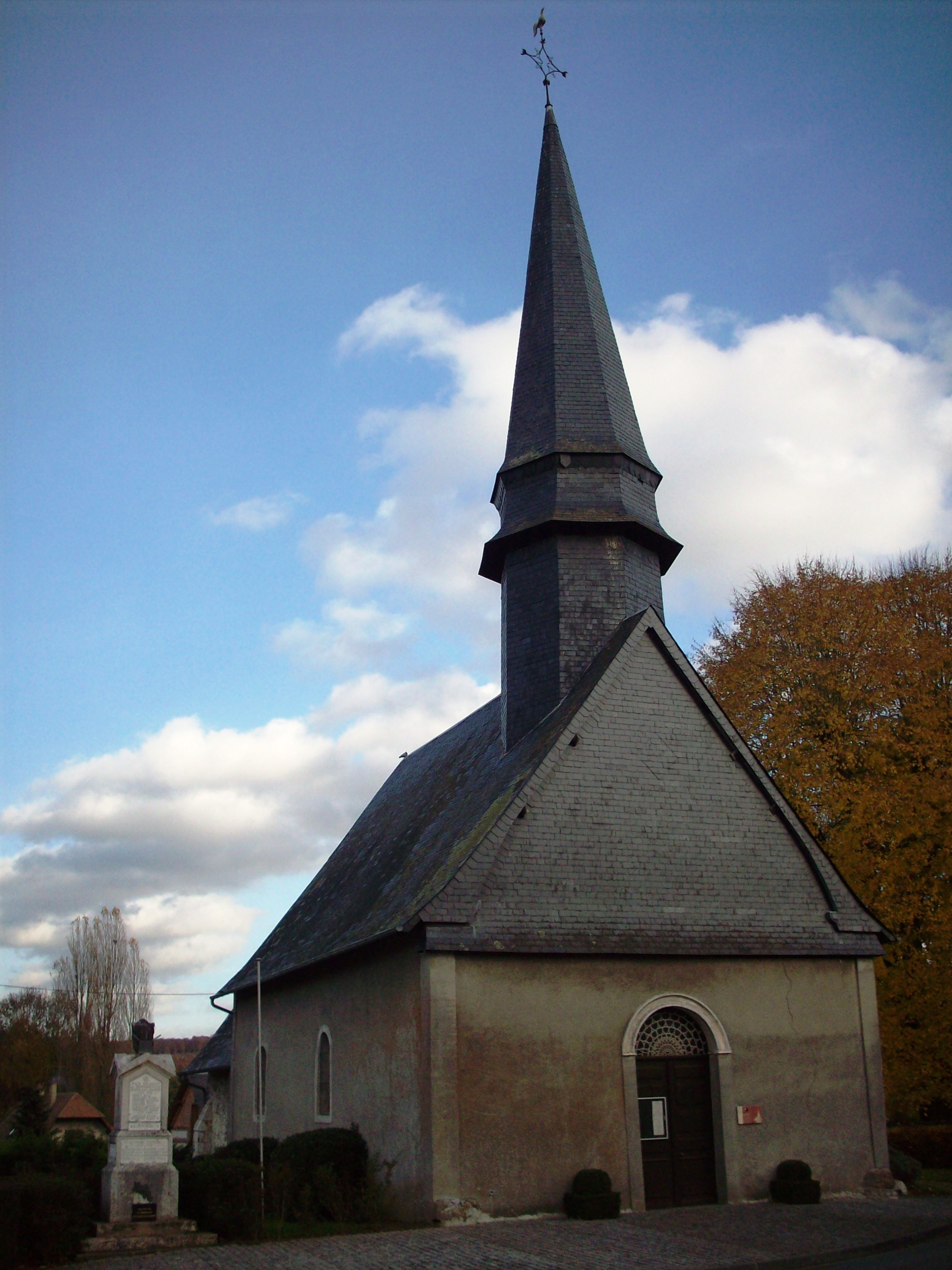 Eglise Notre-Dame et Saint-Aubin de Ménesqueville.